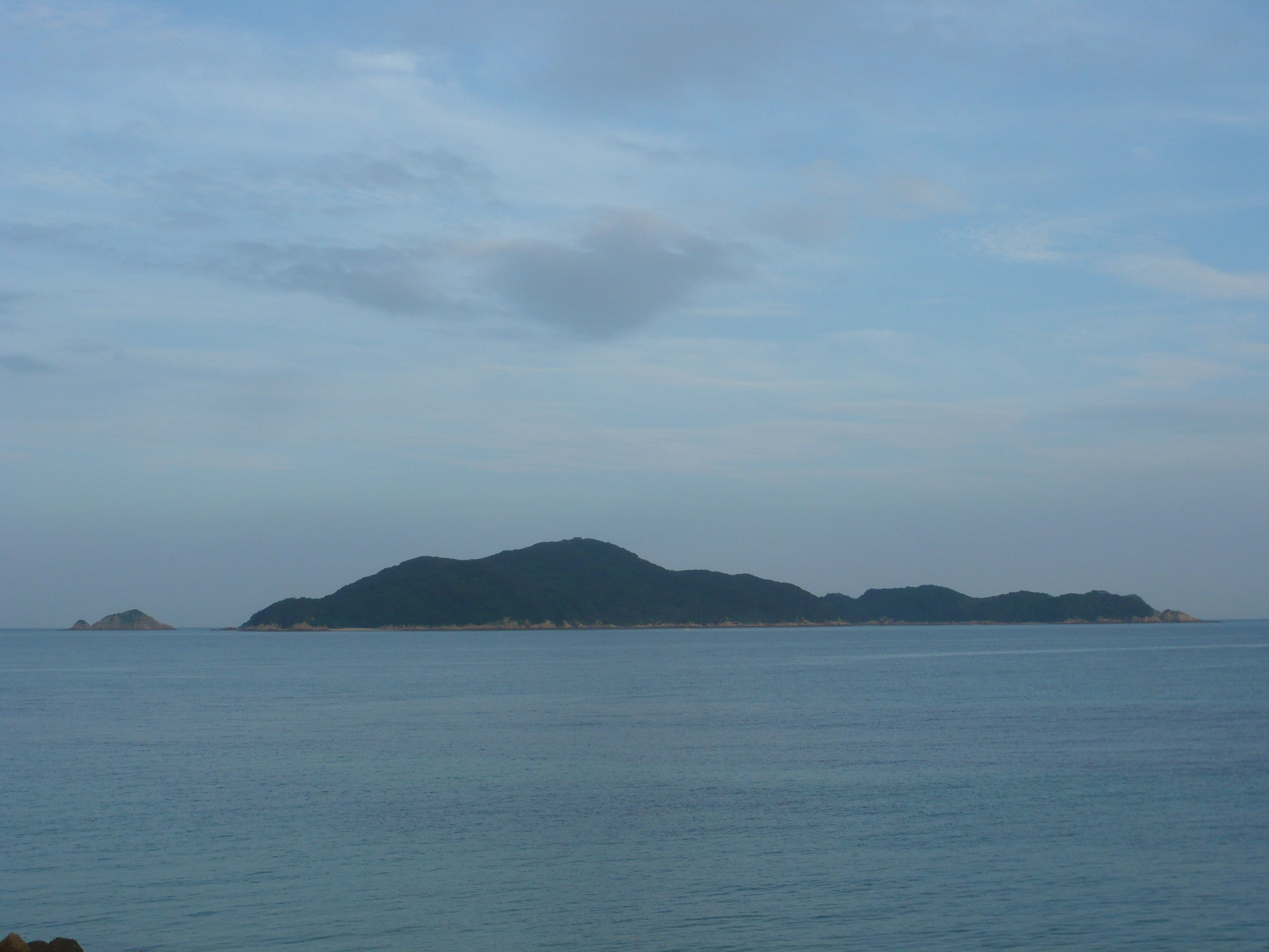 小串駅前、男島